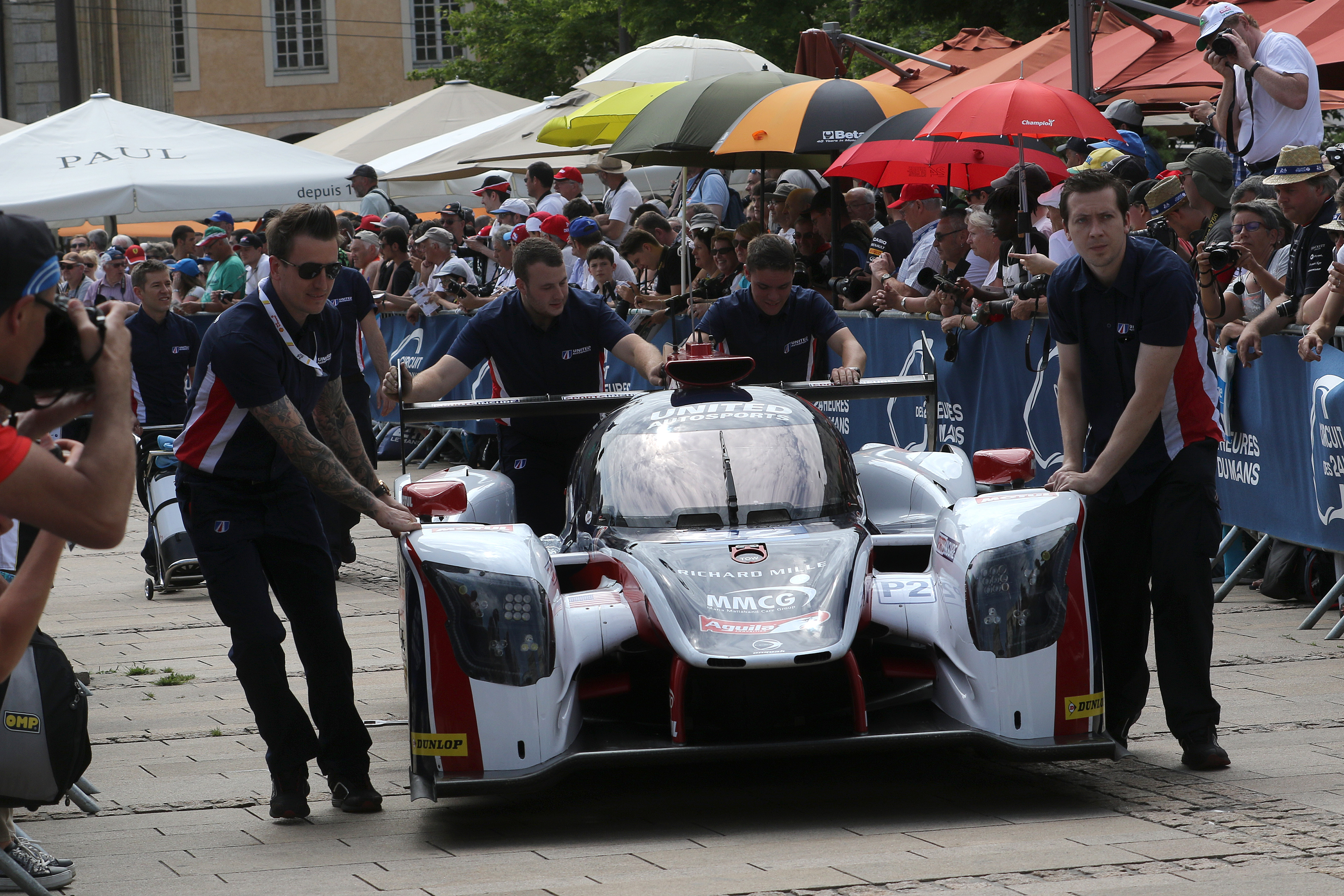 United Autosport lors des 24 Heures du Mans 2017.